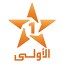 شعار قناة الأولى Al Aoula Tv Logo